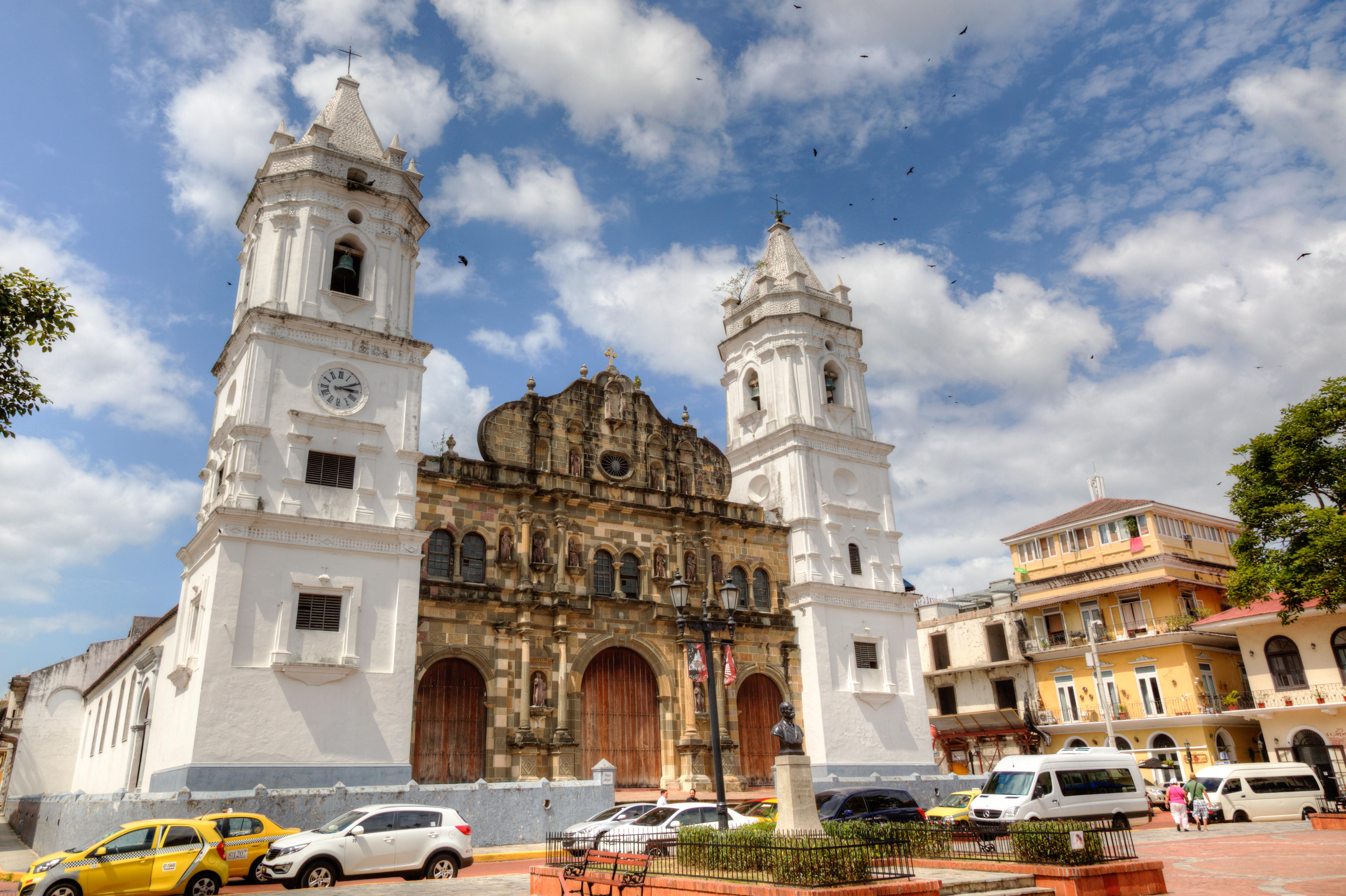 Iglesia Catedral Metropolitana, Panamá